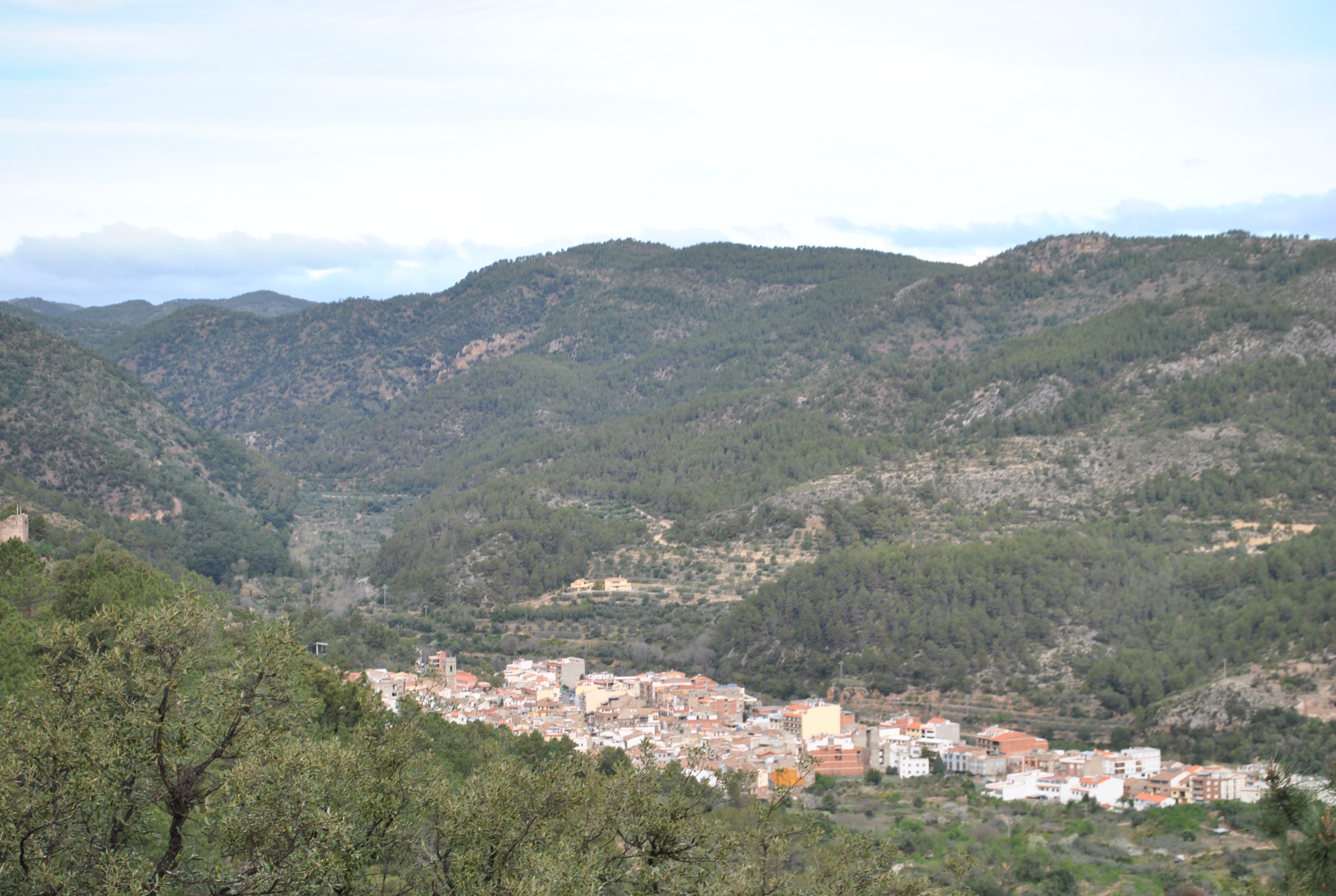 Foto de un Pueblo de la Sierra Espadán (Eslida)